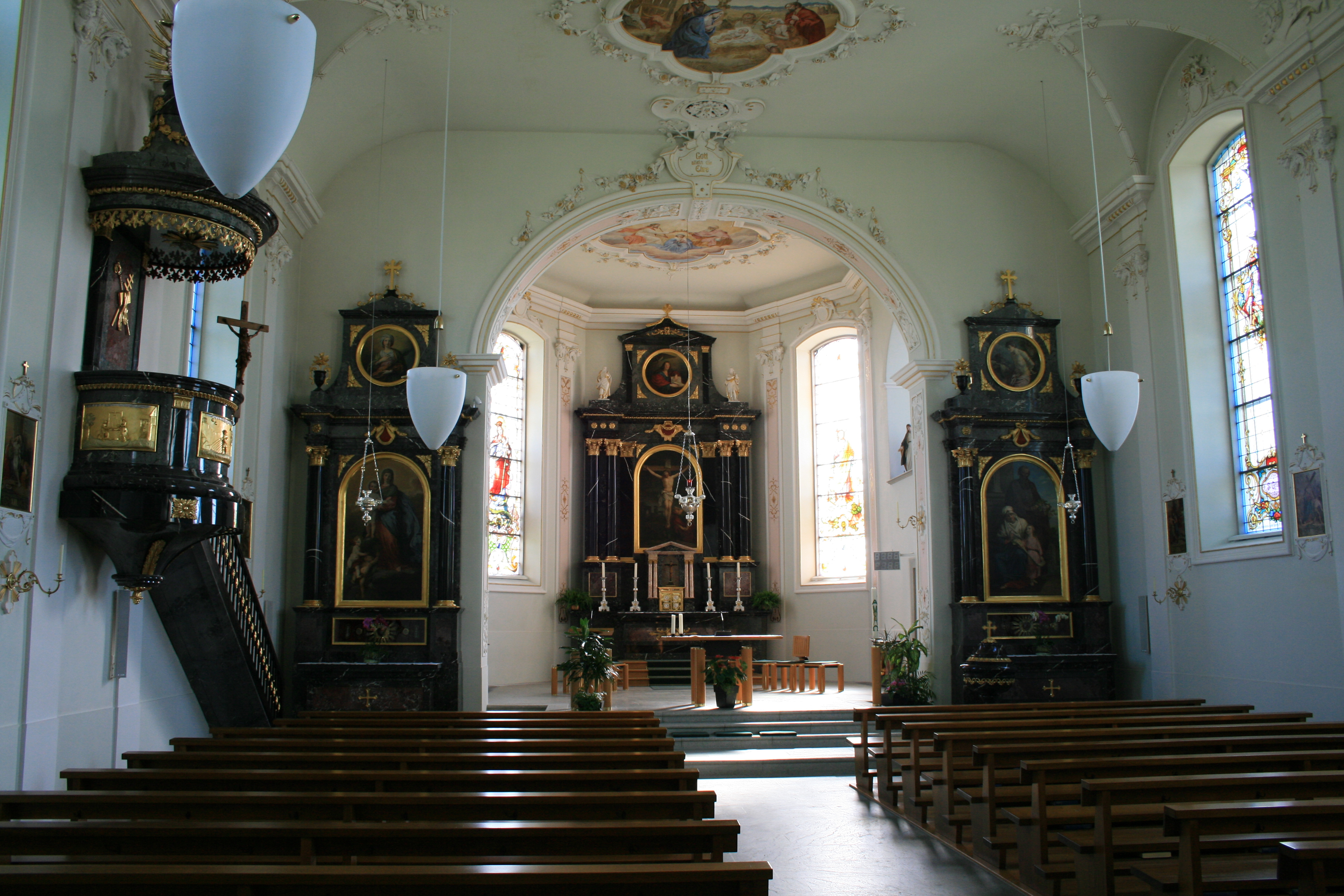 Kirchenschiff und Chor der röm.-kath. Kirche Mühlau mit Altarbildern von Joseph Balmer